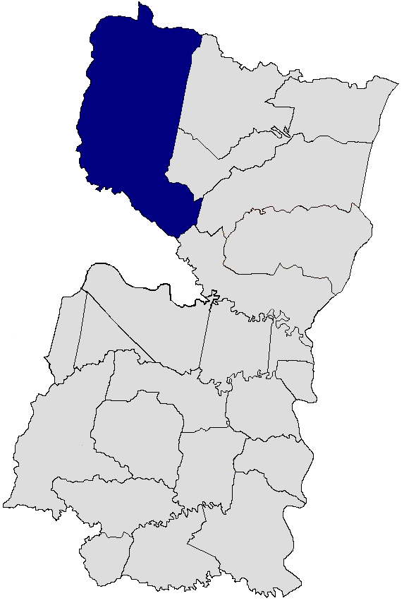 Itakyry, Alto Paraná